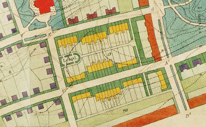 Del av Enskede trädgårdsstad stadsplan 1907 visande radhusområdet